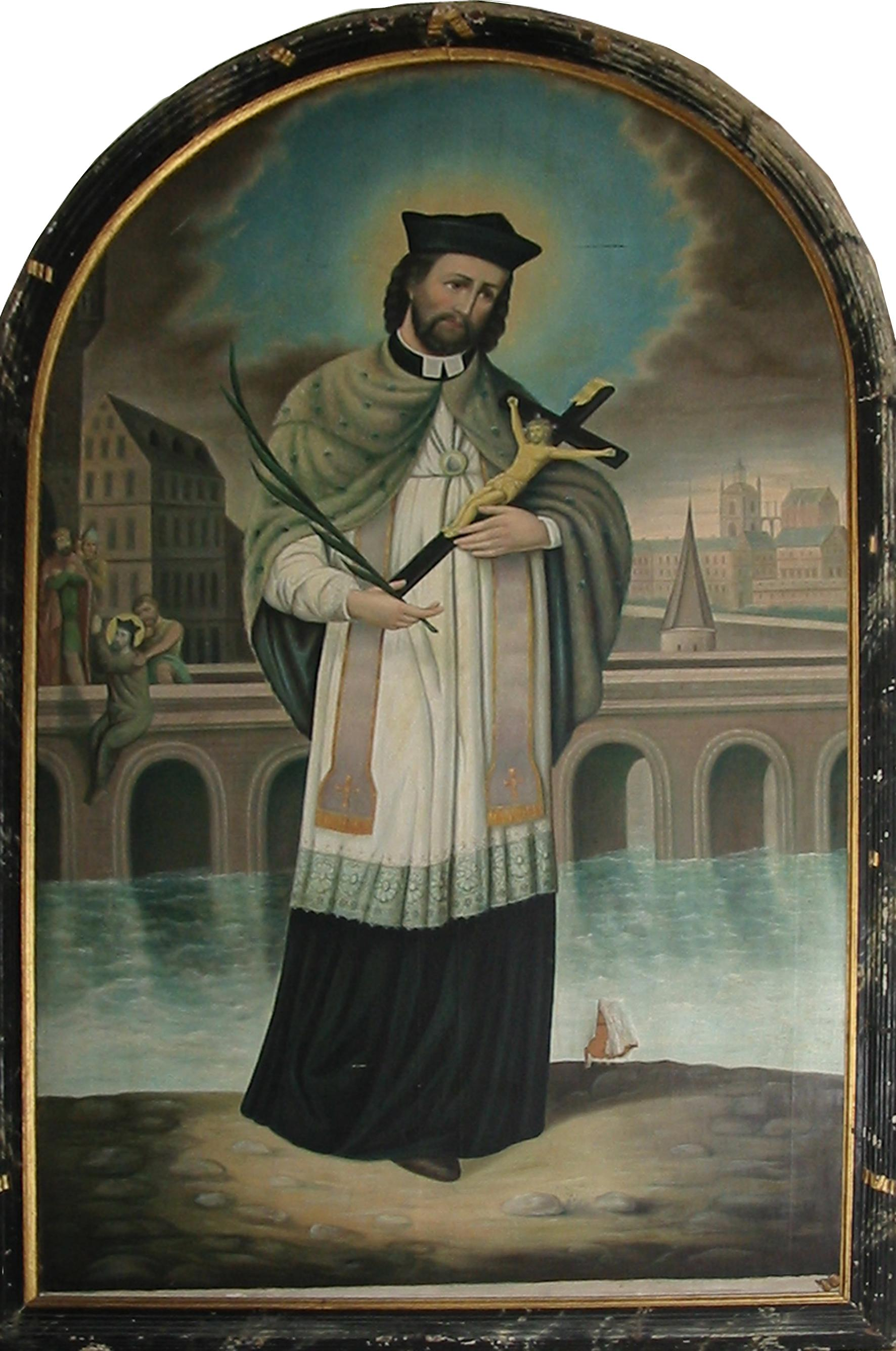 Slika sv. Ivana Nepomuka u samostanu sv. Jurja u Petrovaradinu